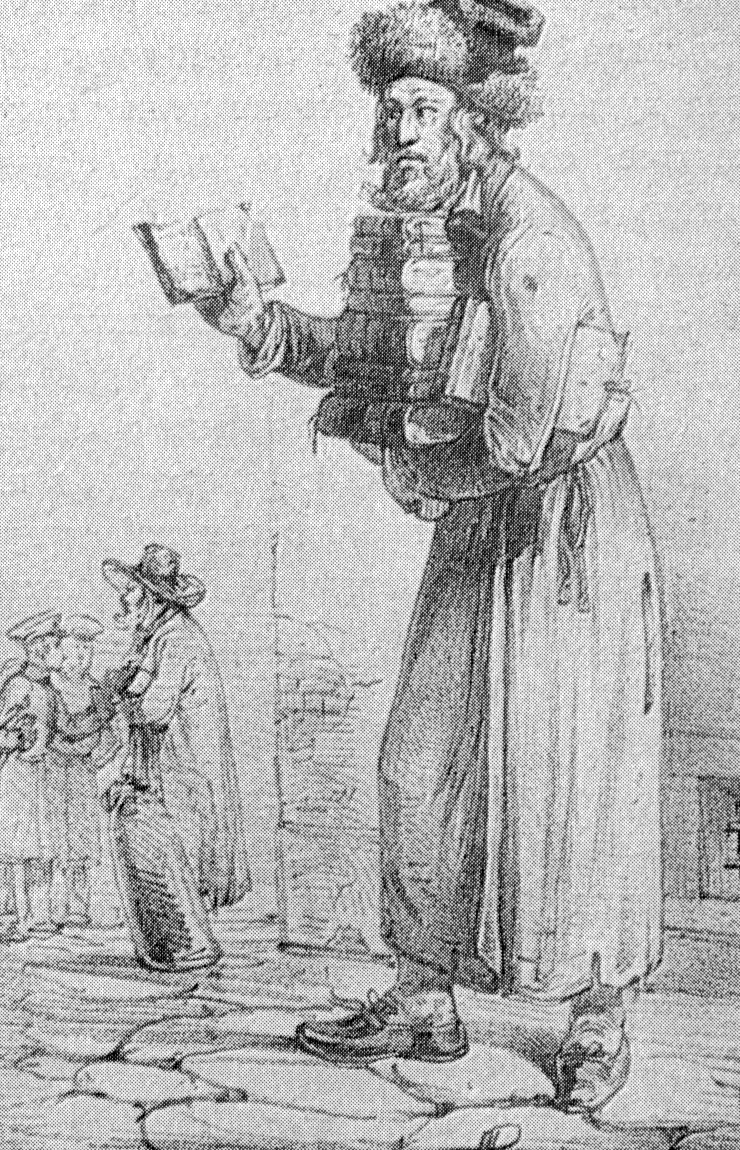 К.Кукевич. Букинист